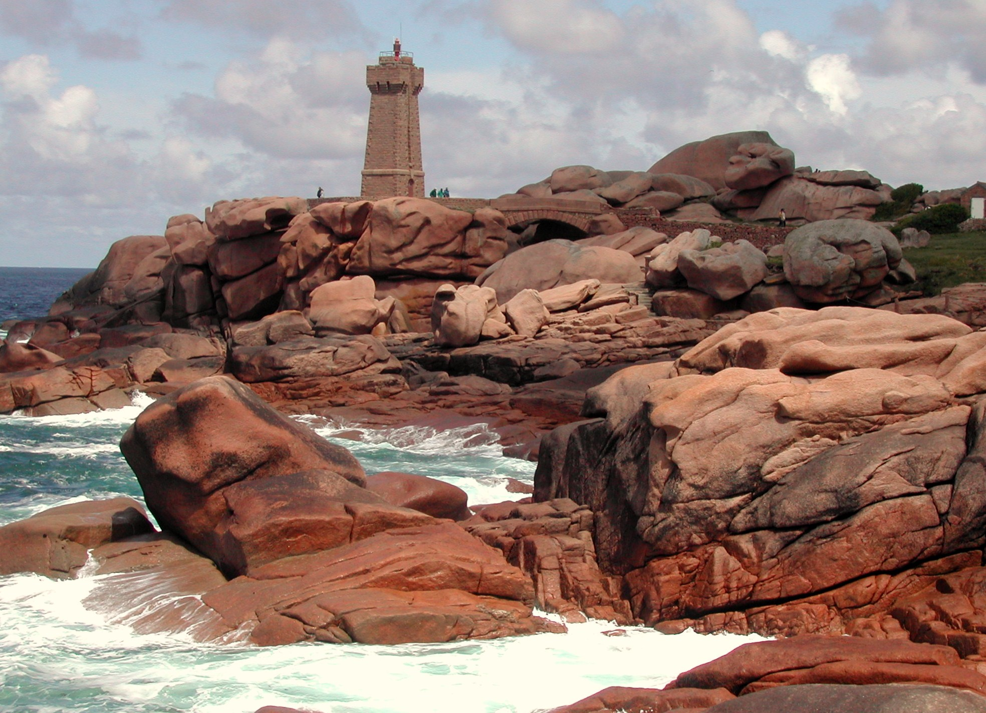 Ploumanac'h dans les Côtes-d'Armor :fr: Bretagne [Bretagne